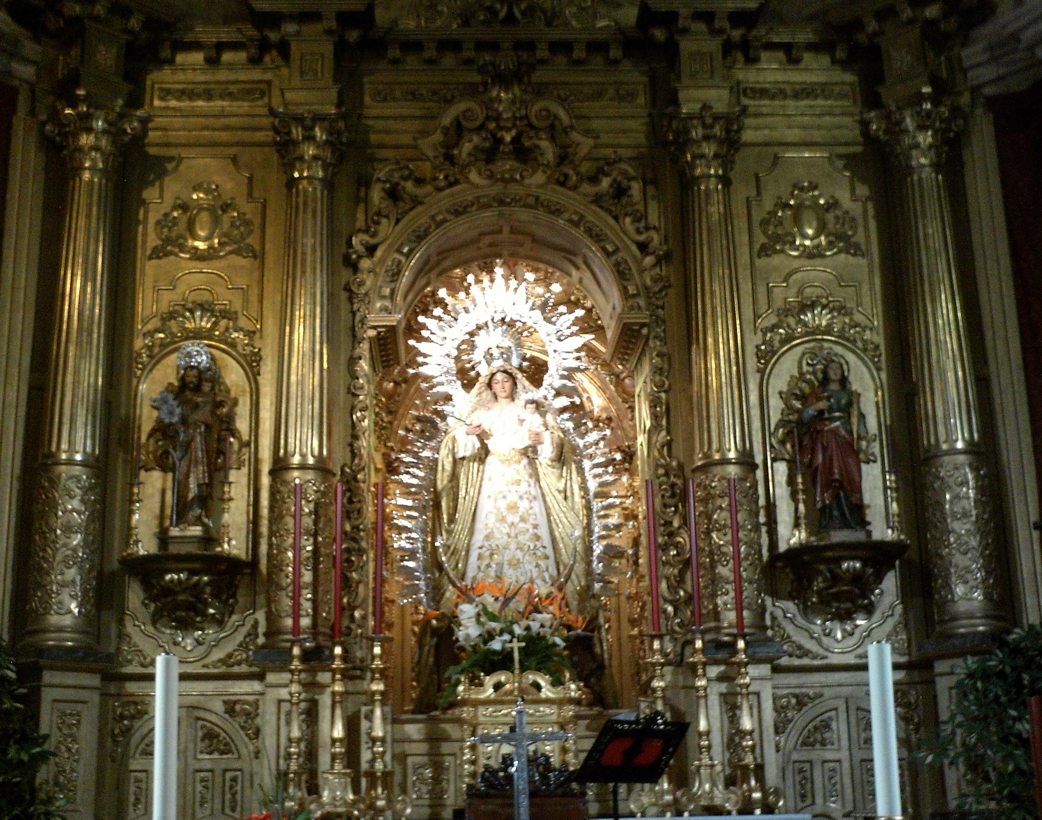 Virgen de la Estrella, en el retablo mayor de la iglesia de la Estrella de Coria del Río, provincia de Sevilla, Andalucía, España.